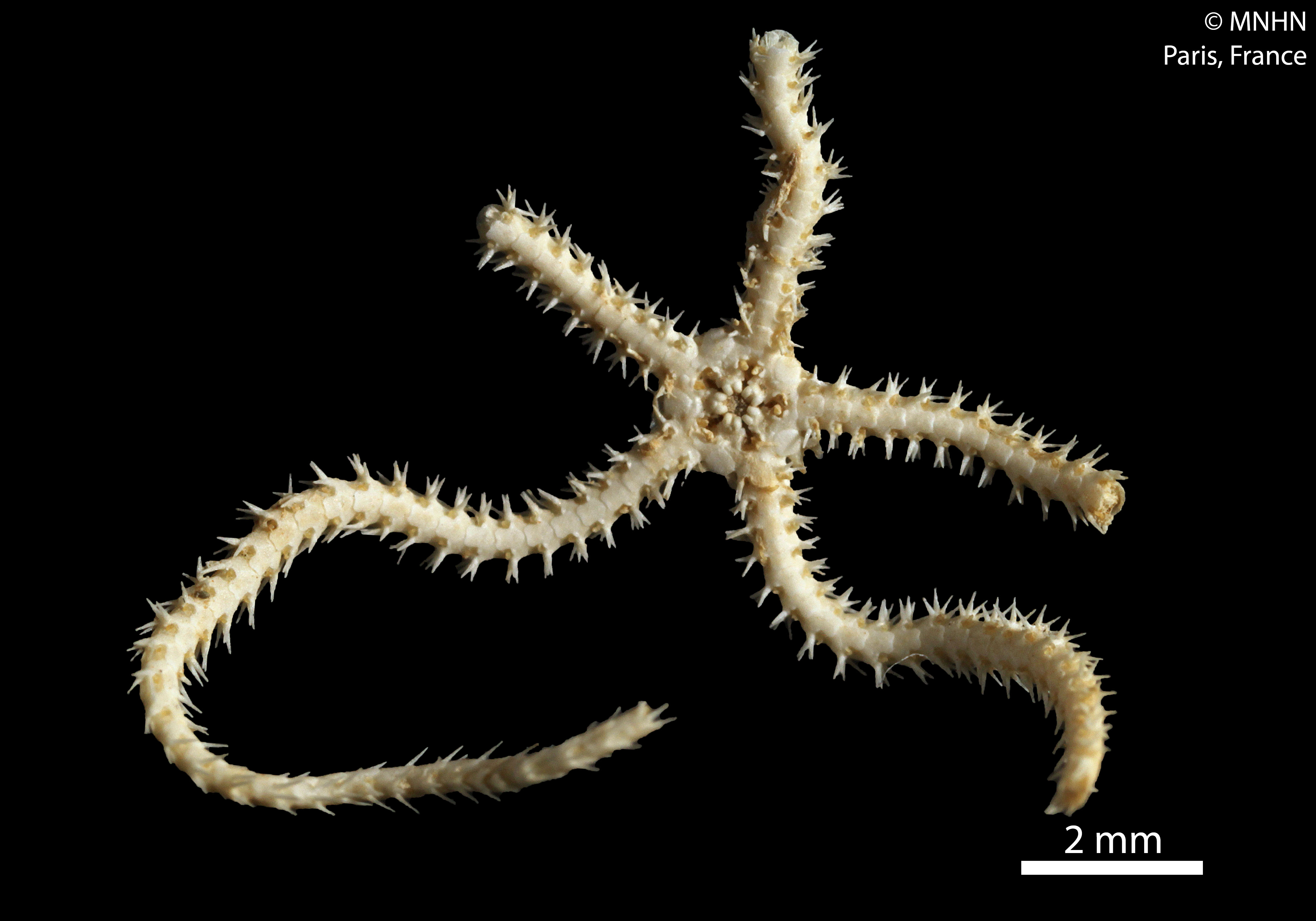 Amphioplus (Amphioplus) parvitusSpécimen MNHN-IE-2013-10129Collection : Échinodermes (IE)Muséum National d'Histoire Naturelle (Paris, France). Origine : Libellé du pays : MADAGASCAR Localité/Lieu-dit : Tuléar Nom du collecteur : Guérin (Mme) Océan : Indien Île : Madagascar Numéro de station : D2 Localité type : Tuléar, 1963, Mme Guérin.